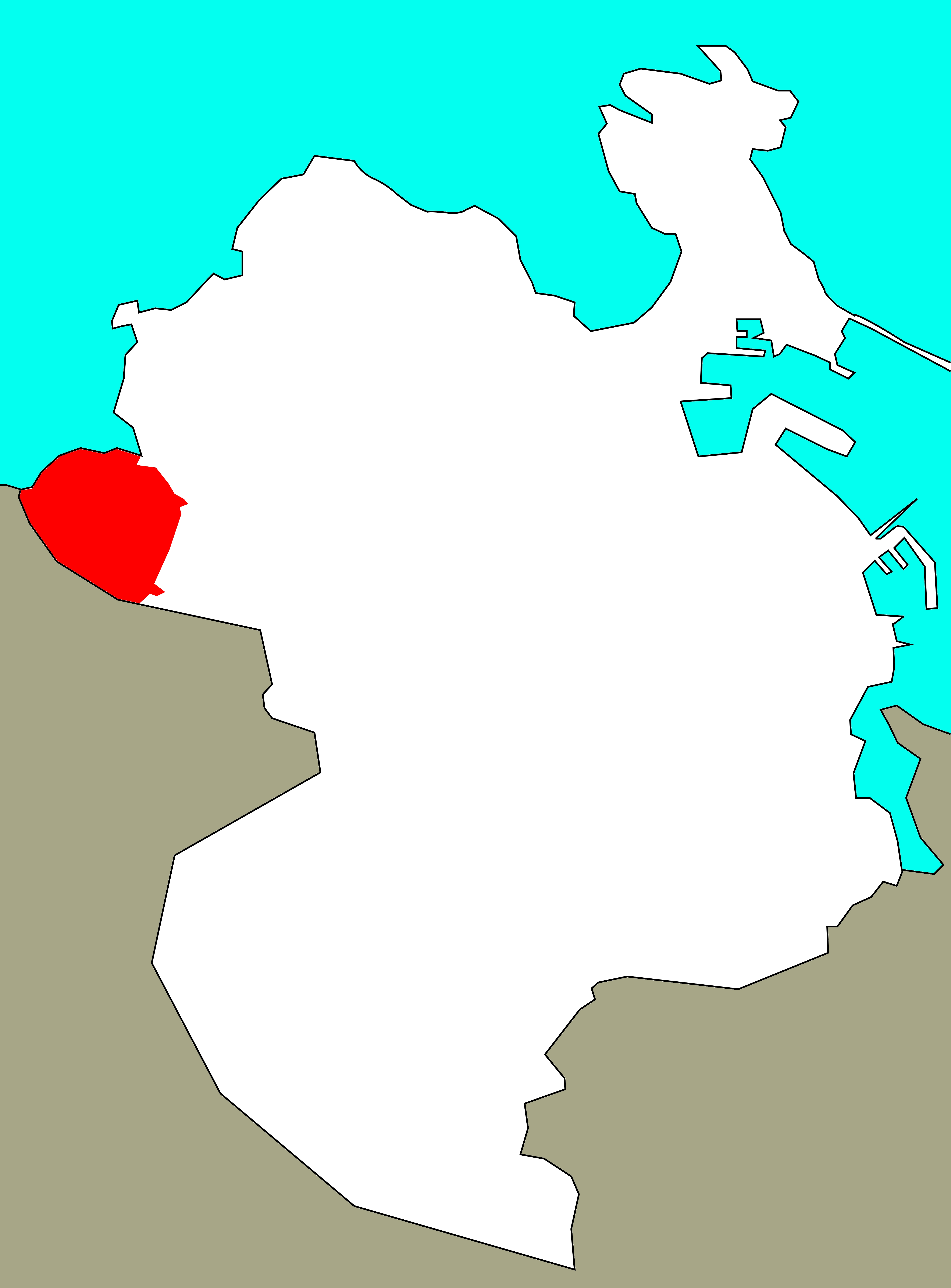 Situación de Nostián no concello da Coruña.[1]